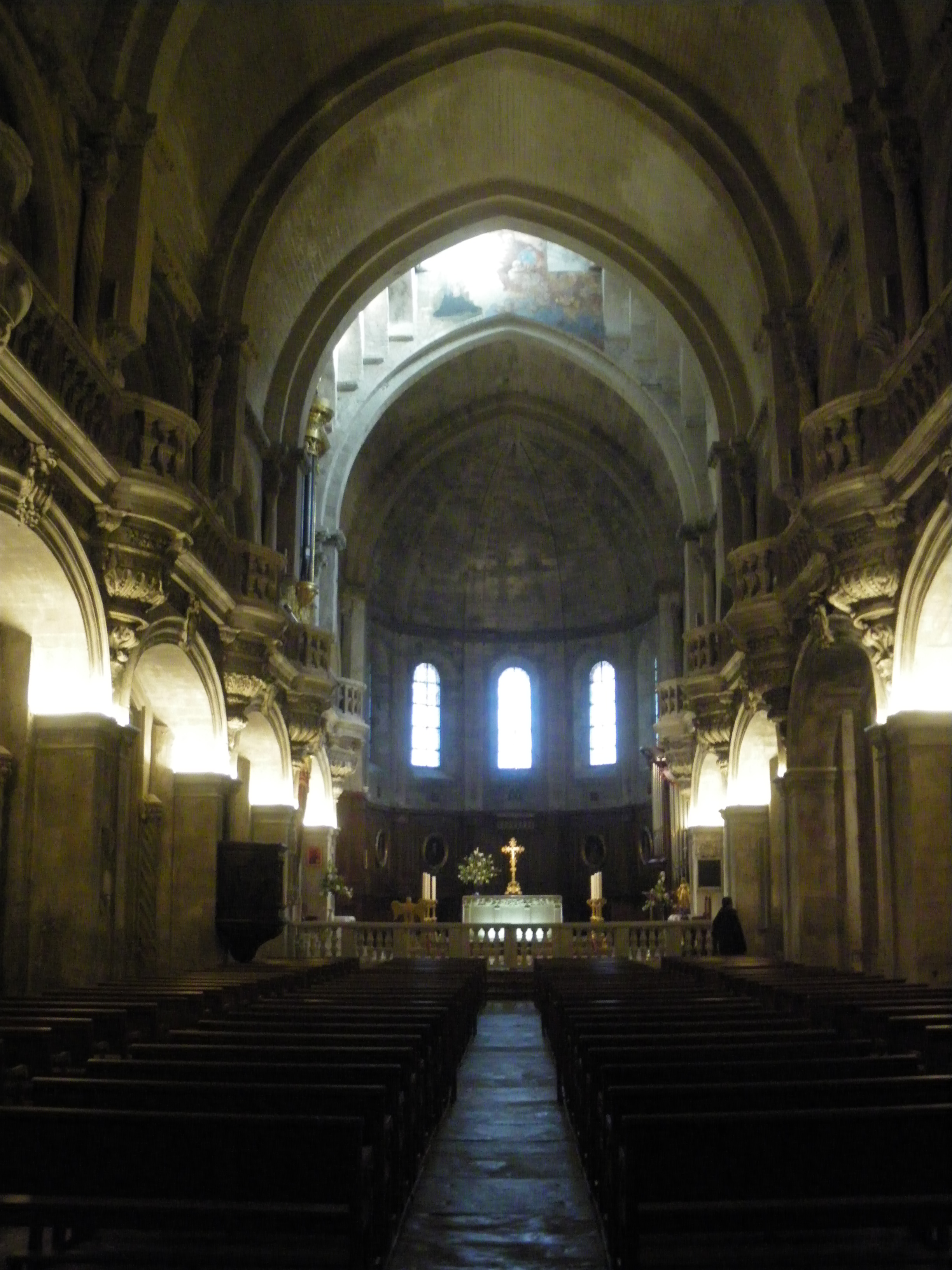 Intérieur de Notre Dame des Doms, Avignon, Vaucluse